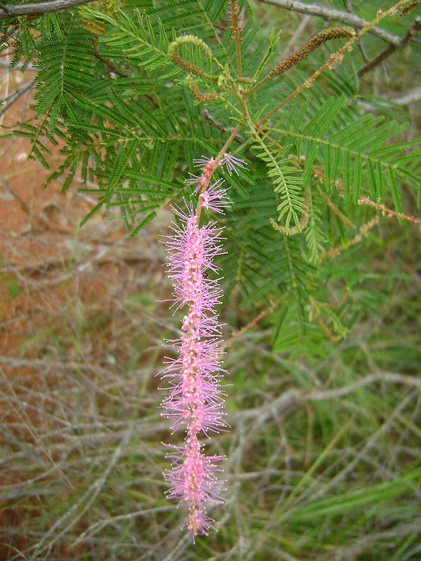 Flor de Carrasquinho ou Angiquinho.